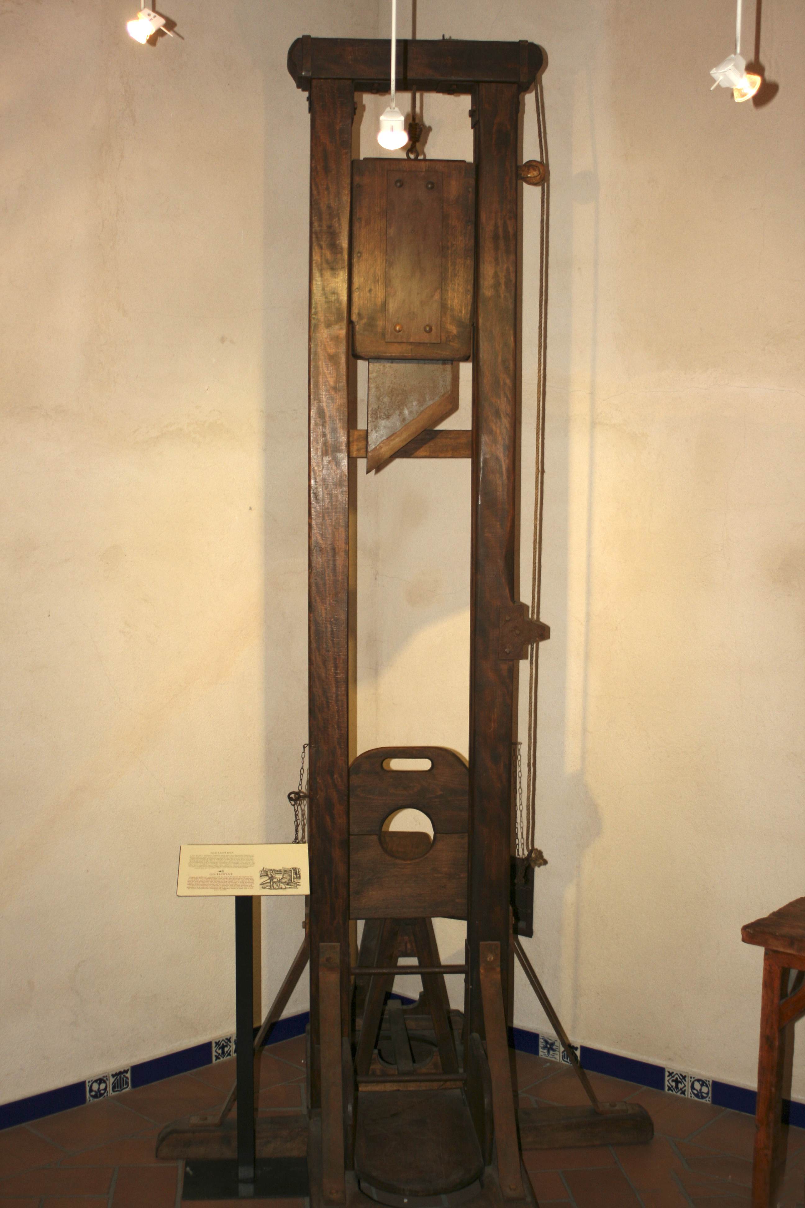 Museo de la Tortura Toledo